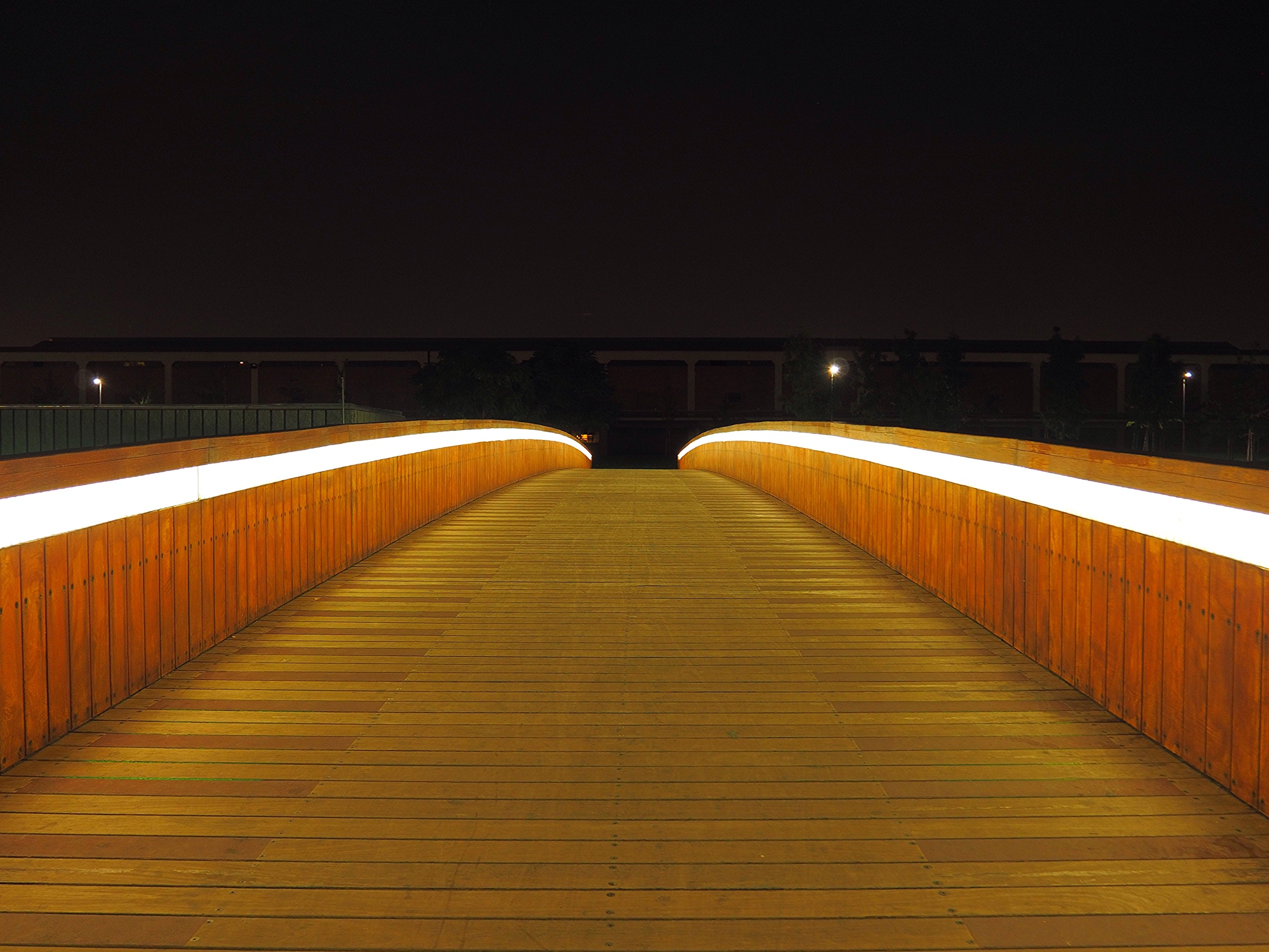 Pasarela de la Princesa. Al fondo el Mercado Central de Frutas y Verduras